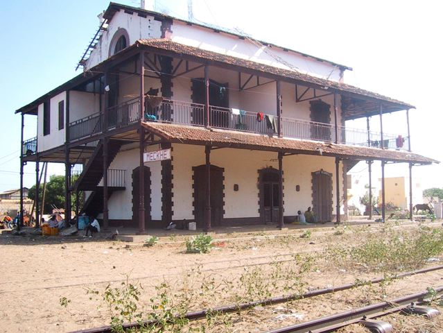 Ancienne gare de Meckhe, Sénégal.